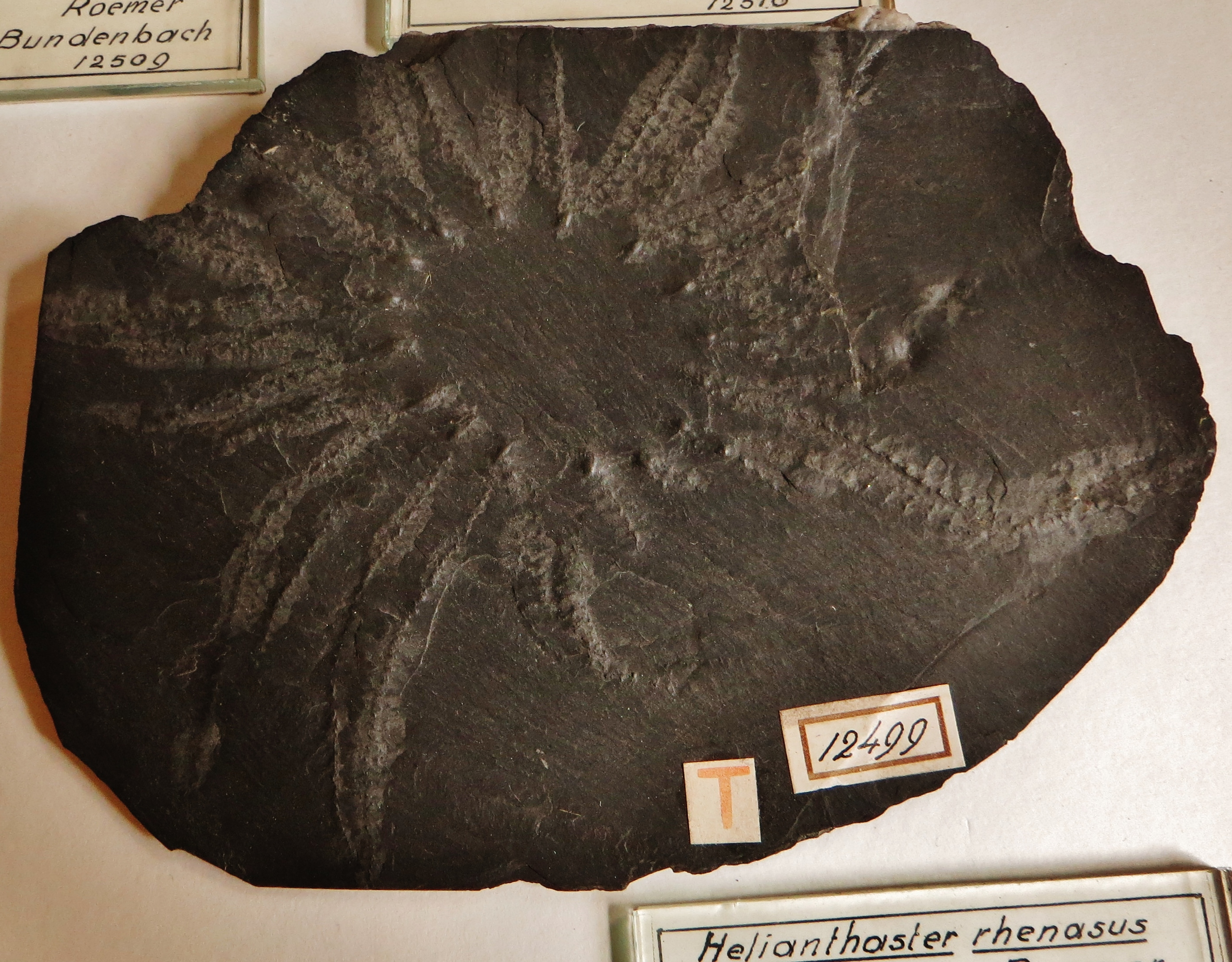 Fossil echinoderm - Took the picture at Teylers Museum, Haarlem